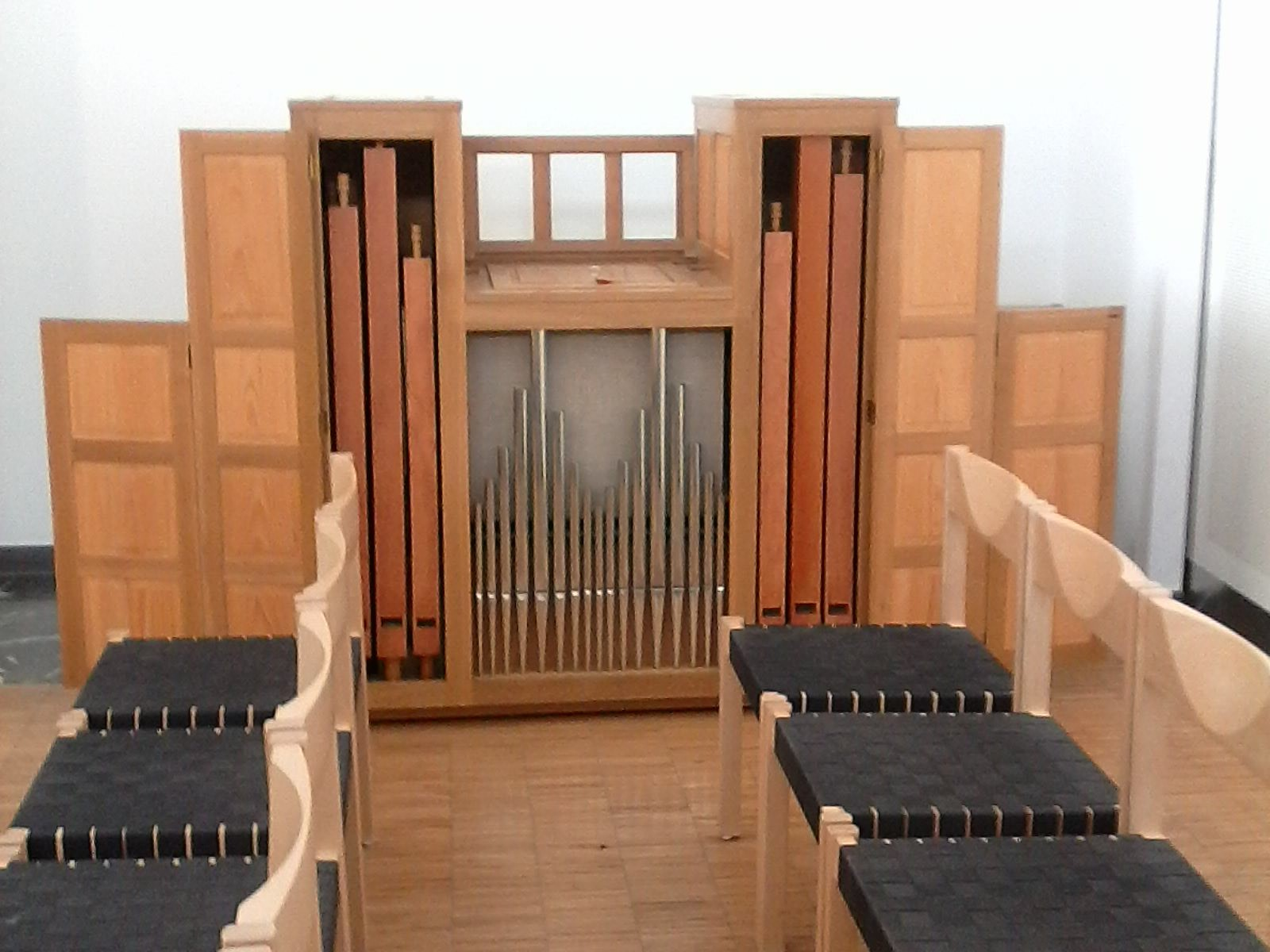 Klais-Orgel im Sana Klinikum Hof, erbaut im Jahr 2000